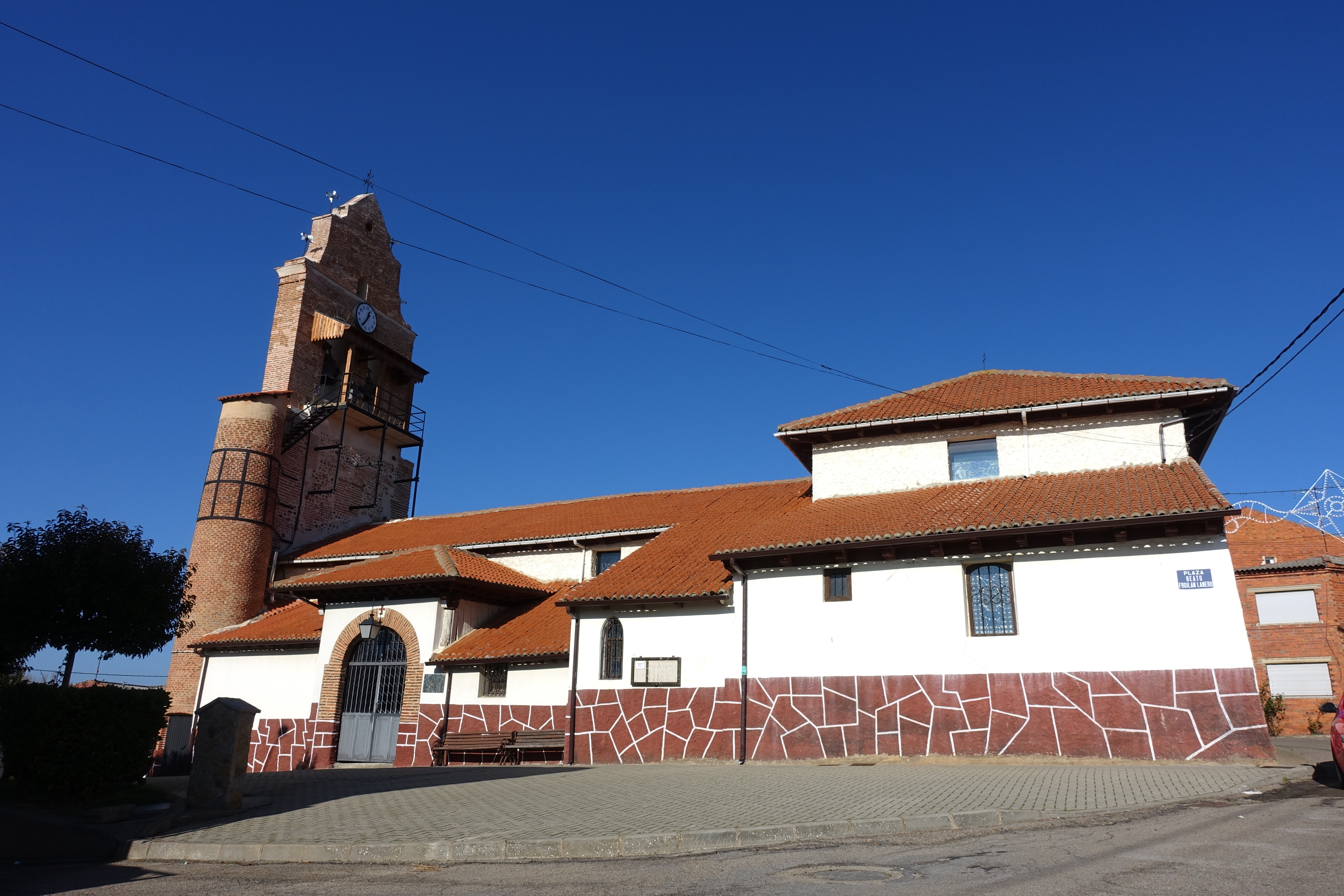 Iglesia de Santiago Apóstol en Villadangos del Páramo (León, España).